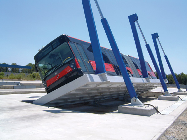 Rollover-Plattform der Applus+ IDIADA